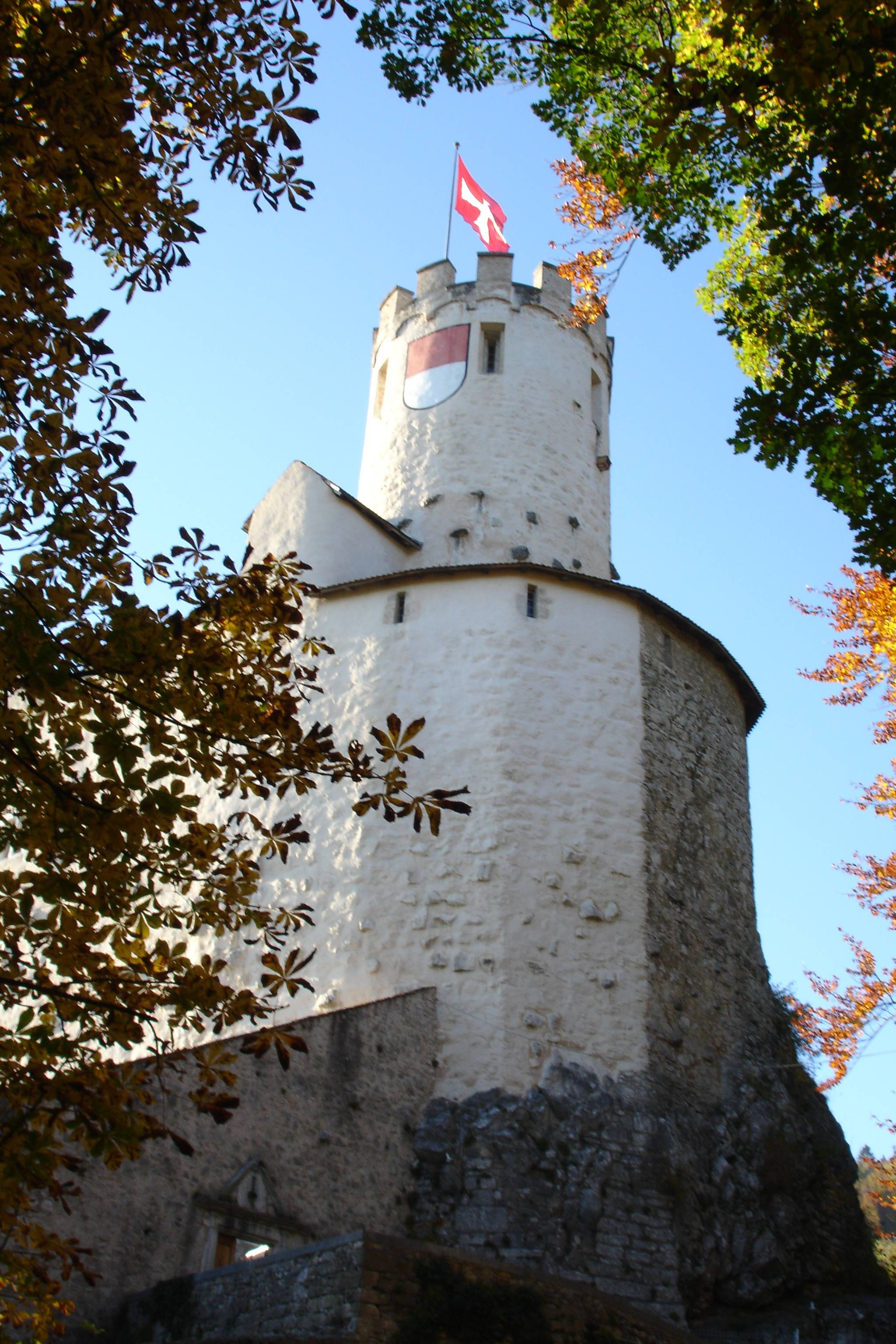 Schloss Neu-Bechburg in Oensingen, Switzerland